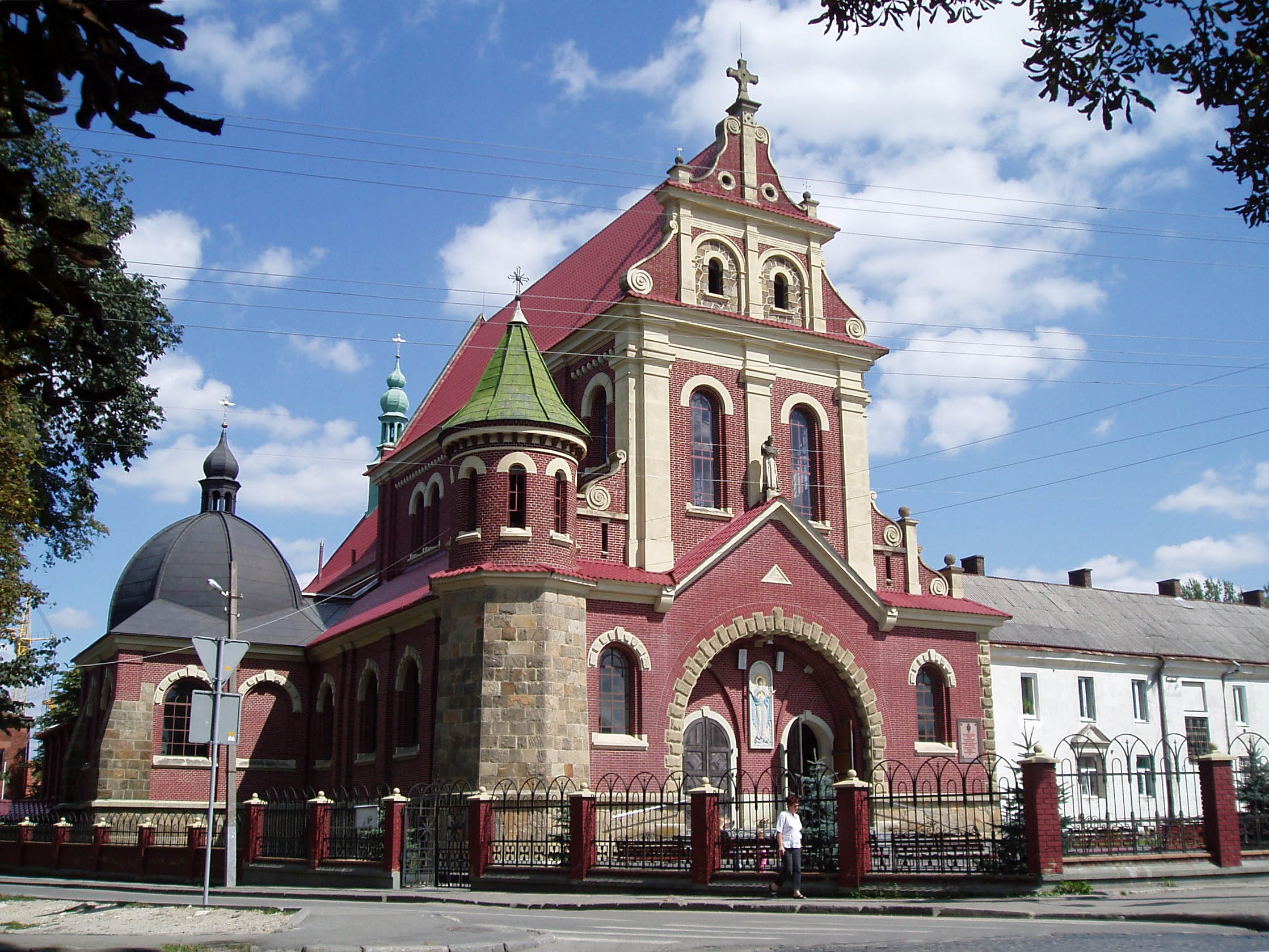 Церква священномученика Йосафата у Львові на вулиці Замарстинівській, 134. Архітектор Ян Кароль Зубжицький.